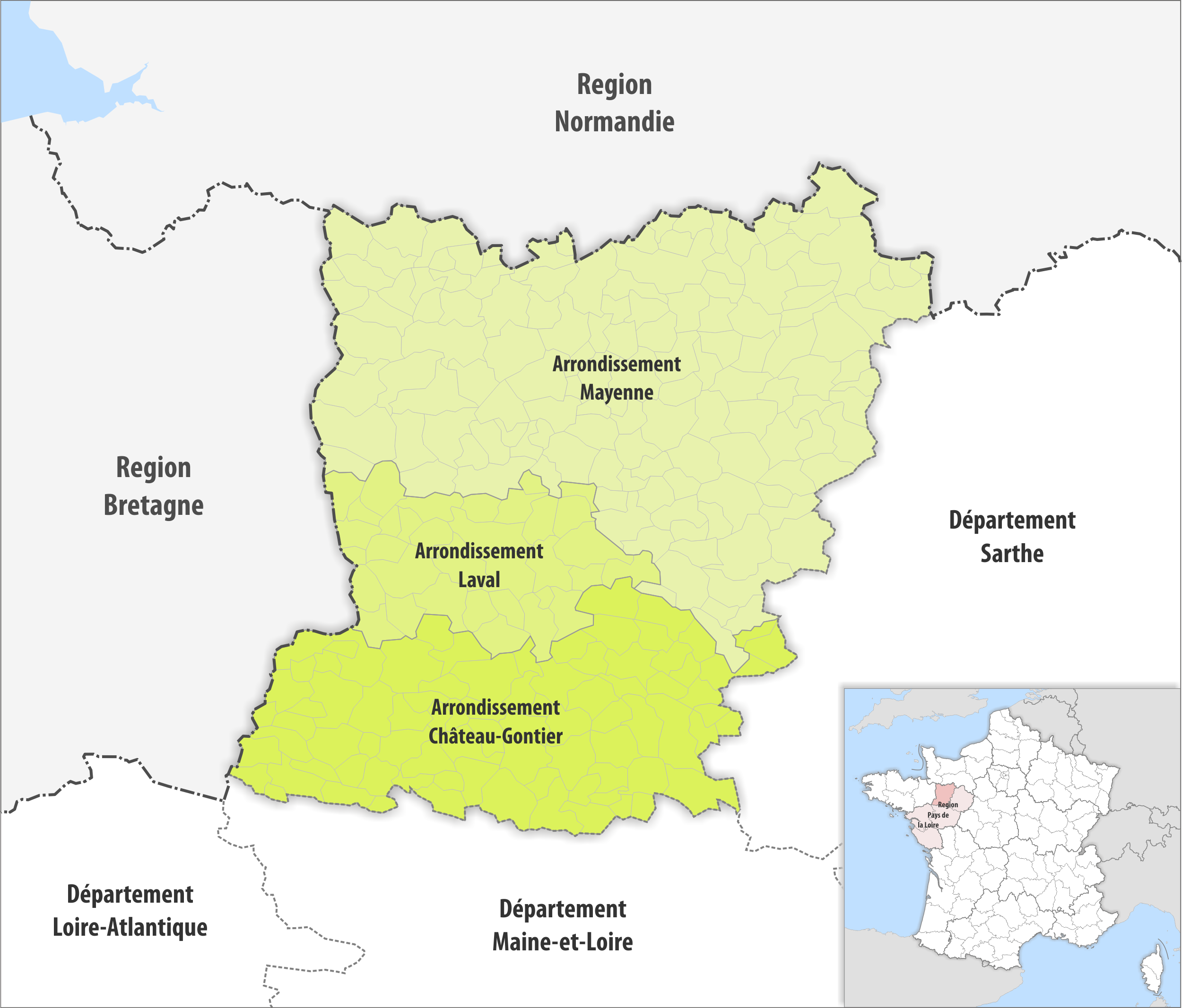 Gemeinden und Arrondissemente im Departement Mayenne